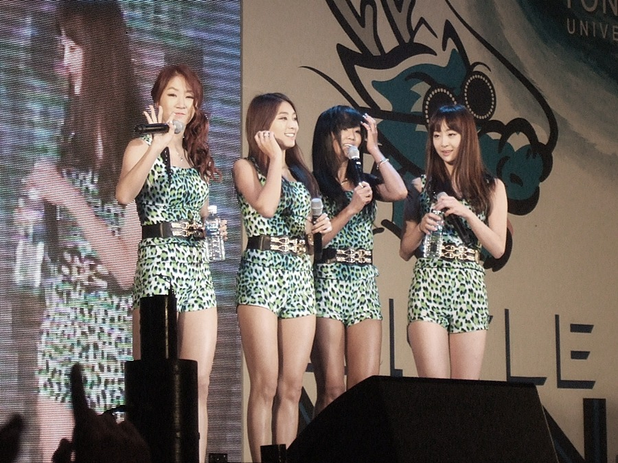 2013년 5월 30일 용인대학교 축제에서 씨스타.